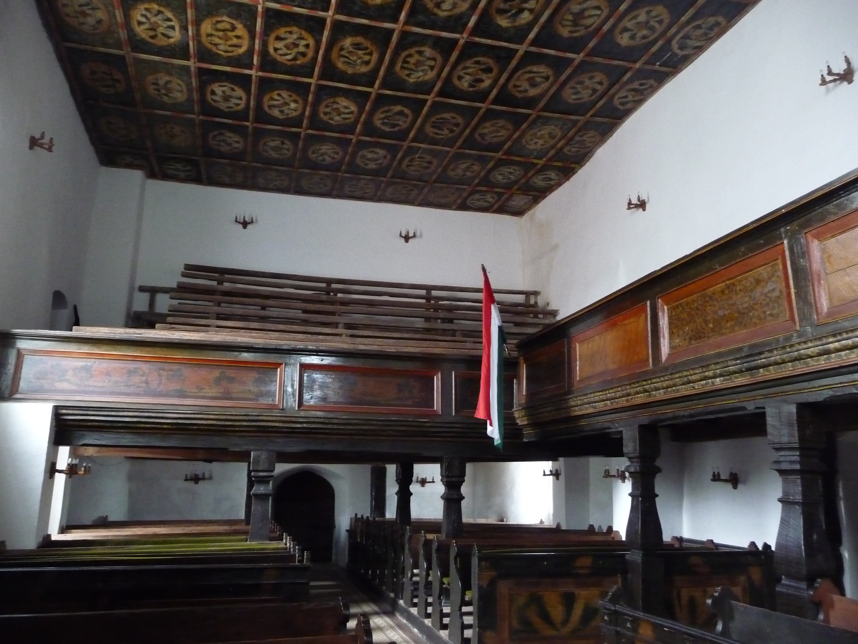 A sajószentpéteri református nagytemplom karzata